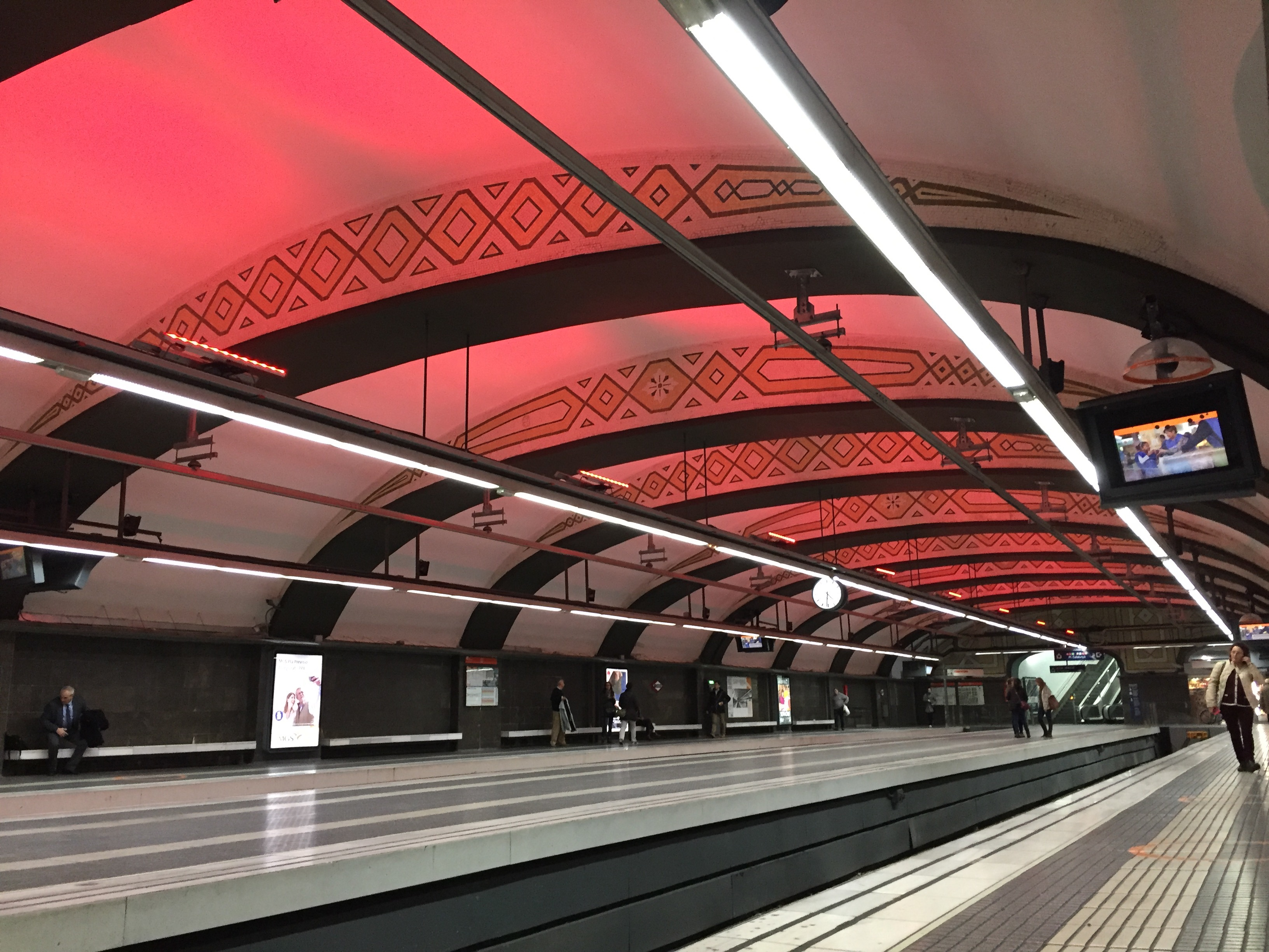 Plaça de Catalunya station